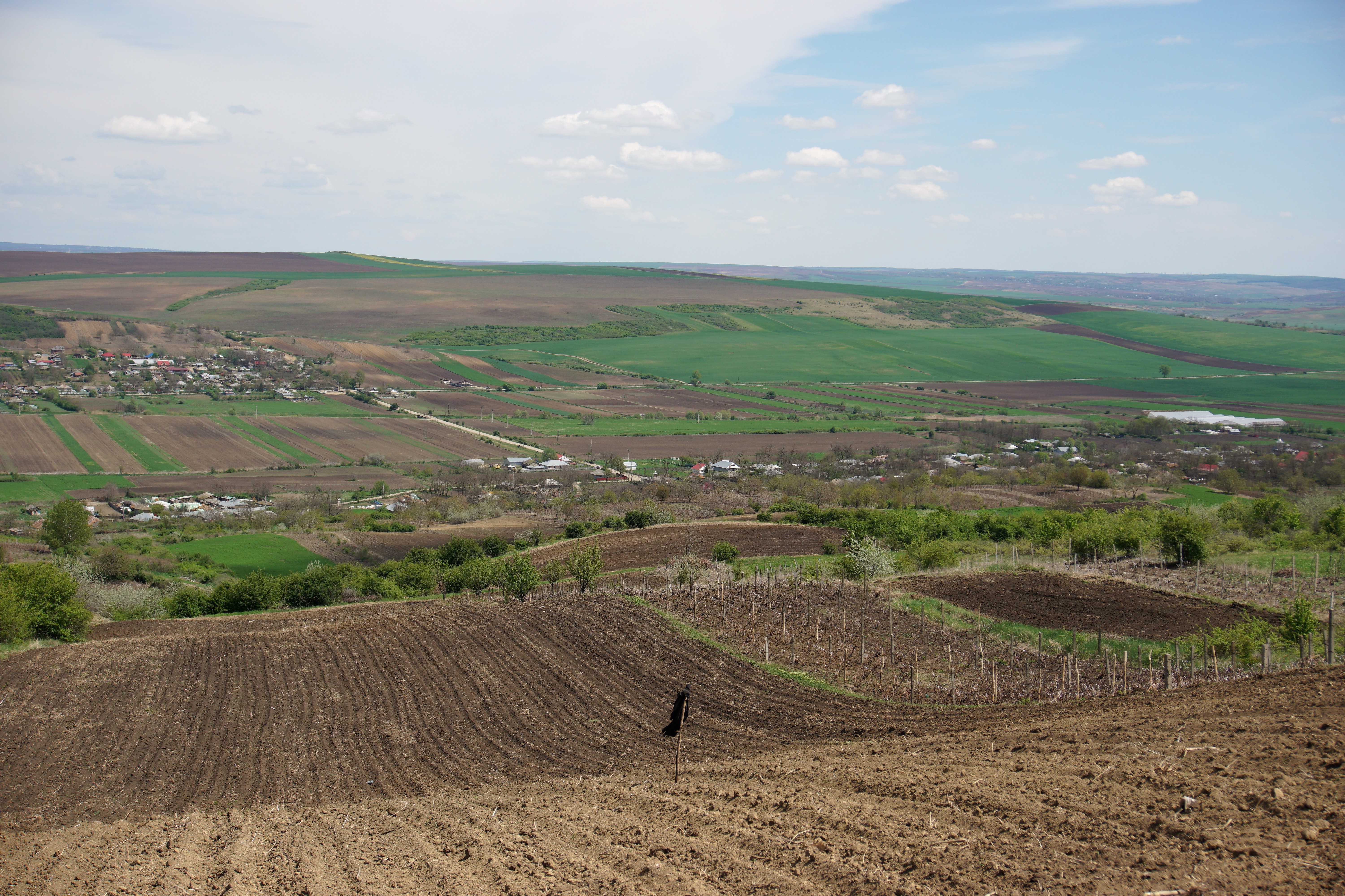 Satul Polocin (în partea de jos a imaginii) și sudul satului Pogonești. Sudul satului Pogonești a fost format după inundațiile din 25-27 martie 1973, de locuitori strămutați din Polocin. Cele 2 sate sunt despărțite de râul Tutova și sunt conectate prin drumul comunal 79.